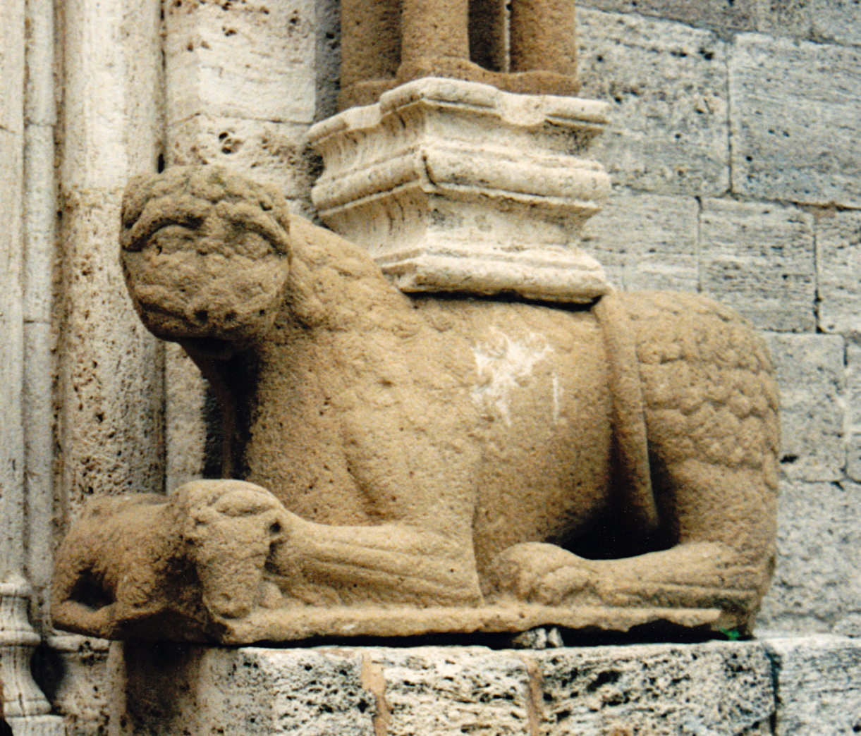 Italie - Toscane - Collégiale de San Quirico d'Orcia